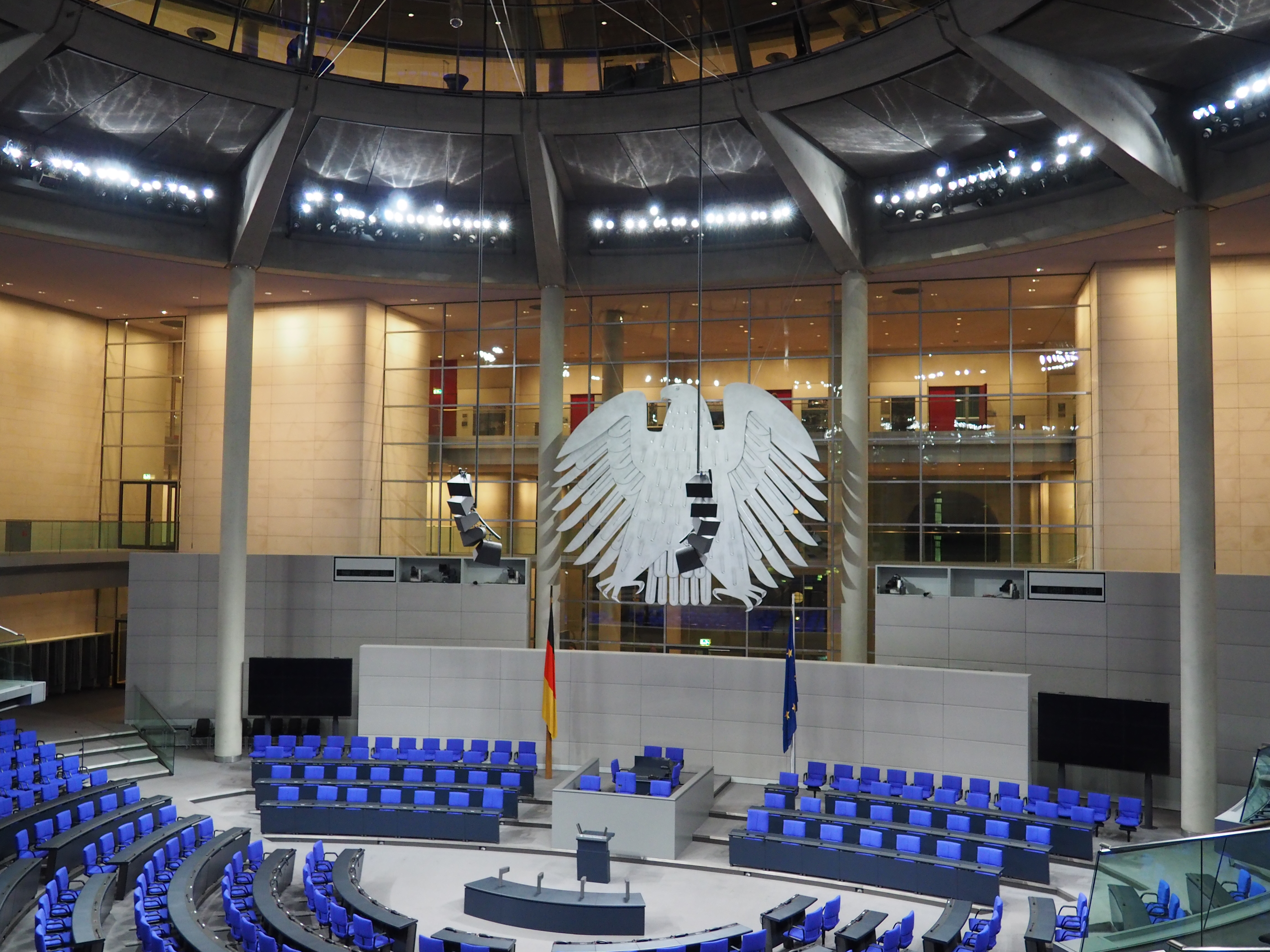 Siège du Bundestag au Palais du Reichstag.